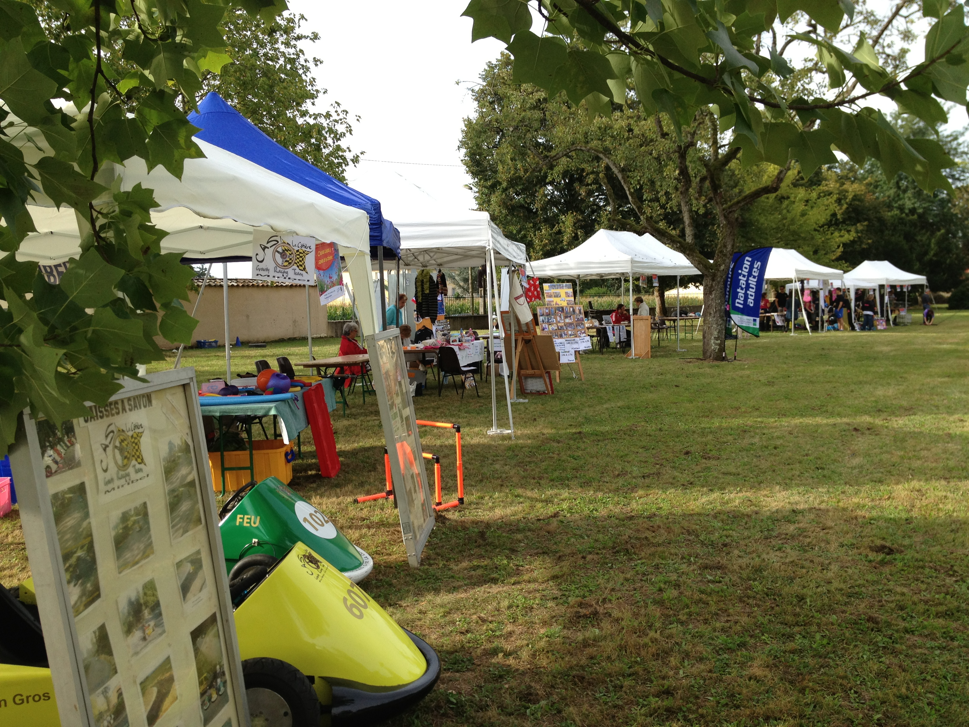 Forum des associations de Saint-Maurice-de-Beynost 2013 à La Sathonette : préparation..